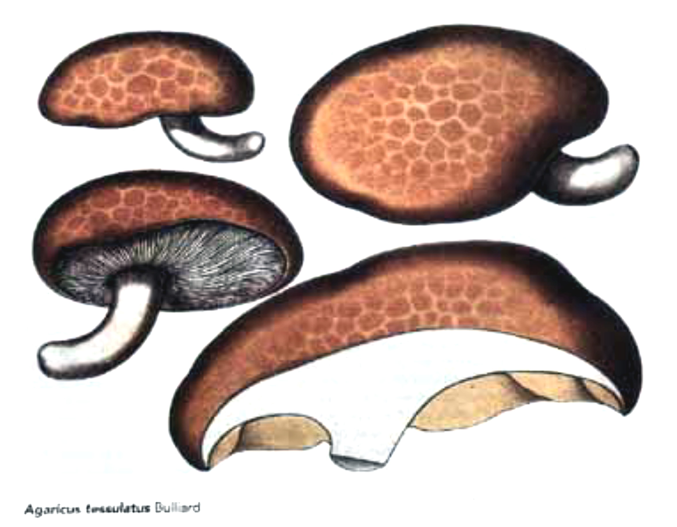 Hypsizygus tessulatus (Bulliard) Singer (1947) Shimédji du hêtre (ブナシメジ)